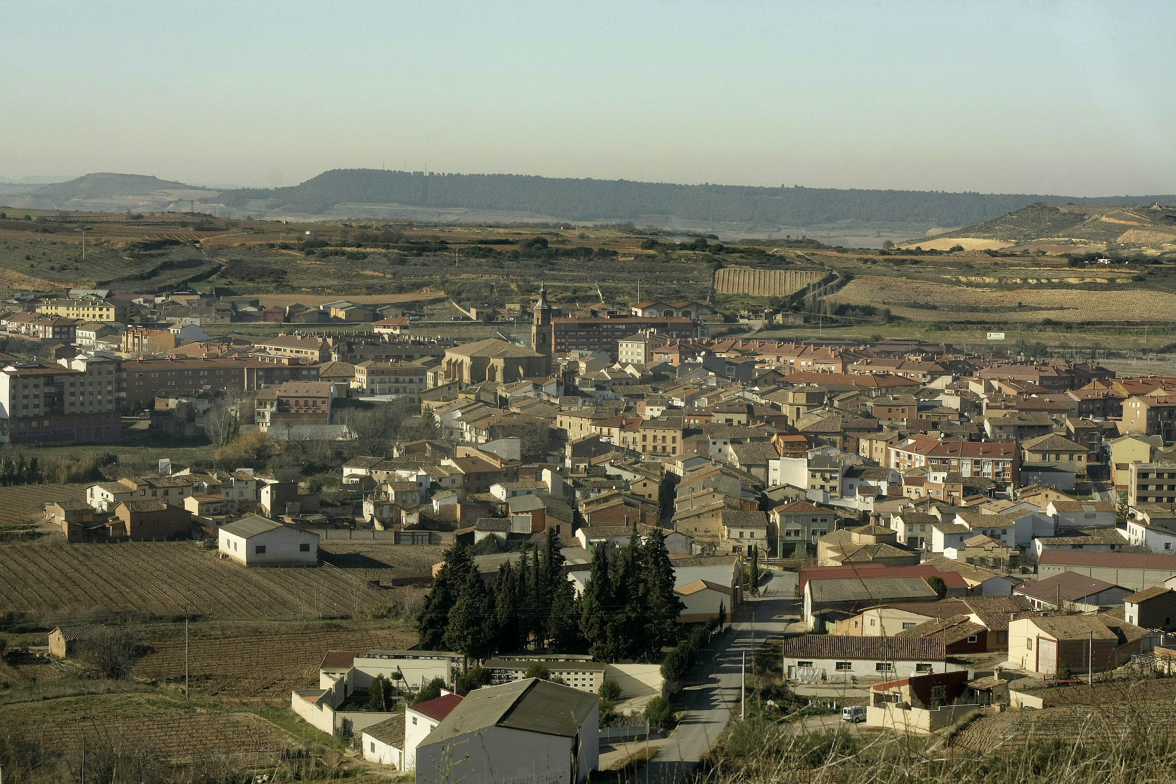 El pueblo riojano Fuenmayor desde el camino viejo a Logroño.